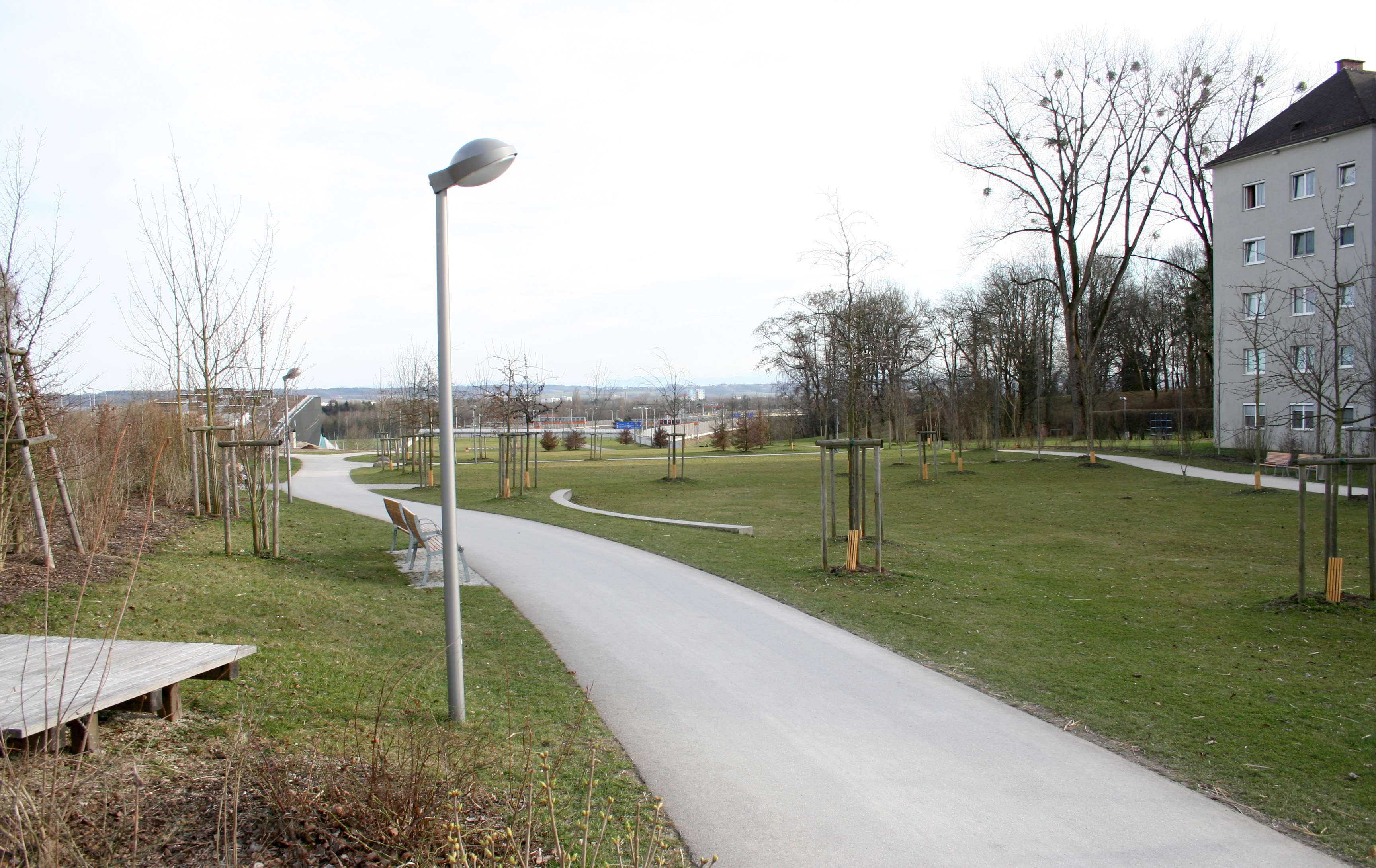 Südteil